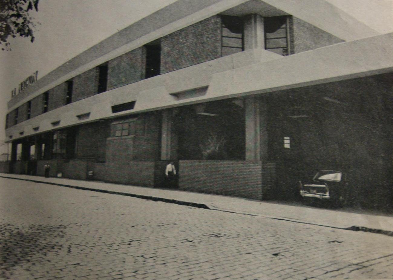 El edificio del Diario La Nación en la calle Bouchard, entre Tucumán y Viamonte. Fue proyectado por el Estudio SEPRA en 1960, se terminó recién en 1979. La foto corresponde a la 1º etapa finalizada del edificio, comprendiendo la planta baja y primer piso, inaugurada en 1969. En 2004 fue totalmente remodelado y se le agrego una torre, transformandose en el Bouchard Plaza, que continuó alojando en uno de sus pisos al diario.